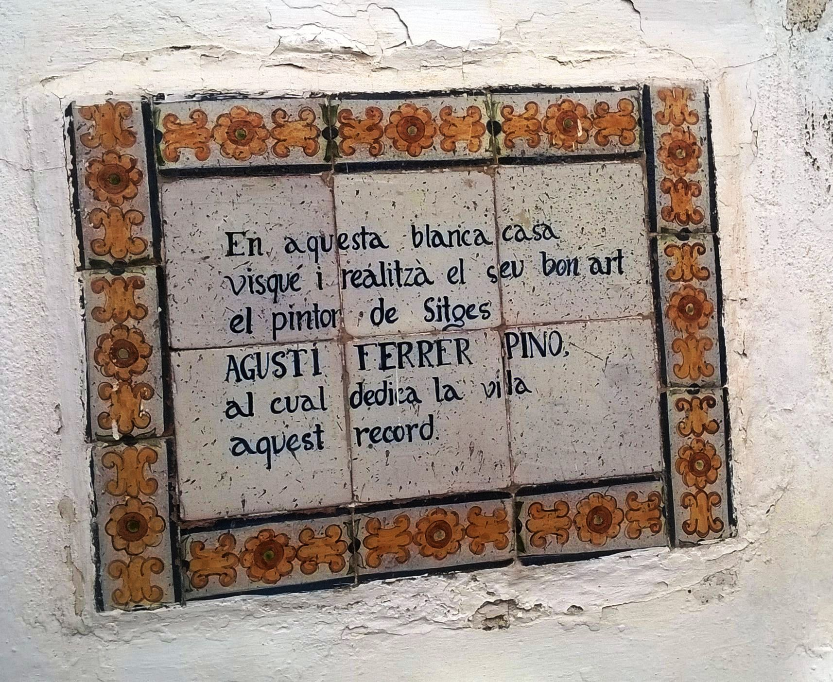 Placa Commemorativa a la casa on visqué Agustí Ferrer i Pino a la vila de Sitges. Pintor, artista independent i excel·lent dibuixant.